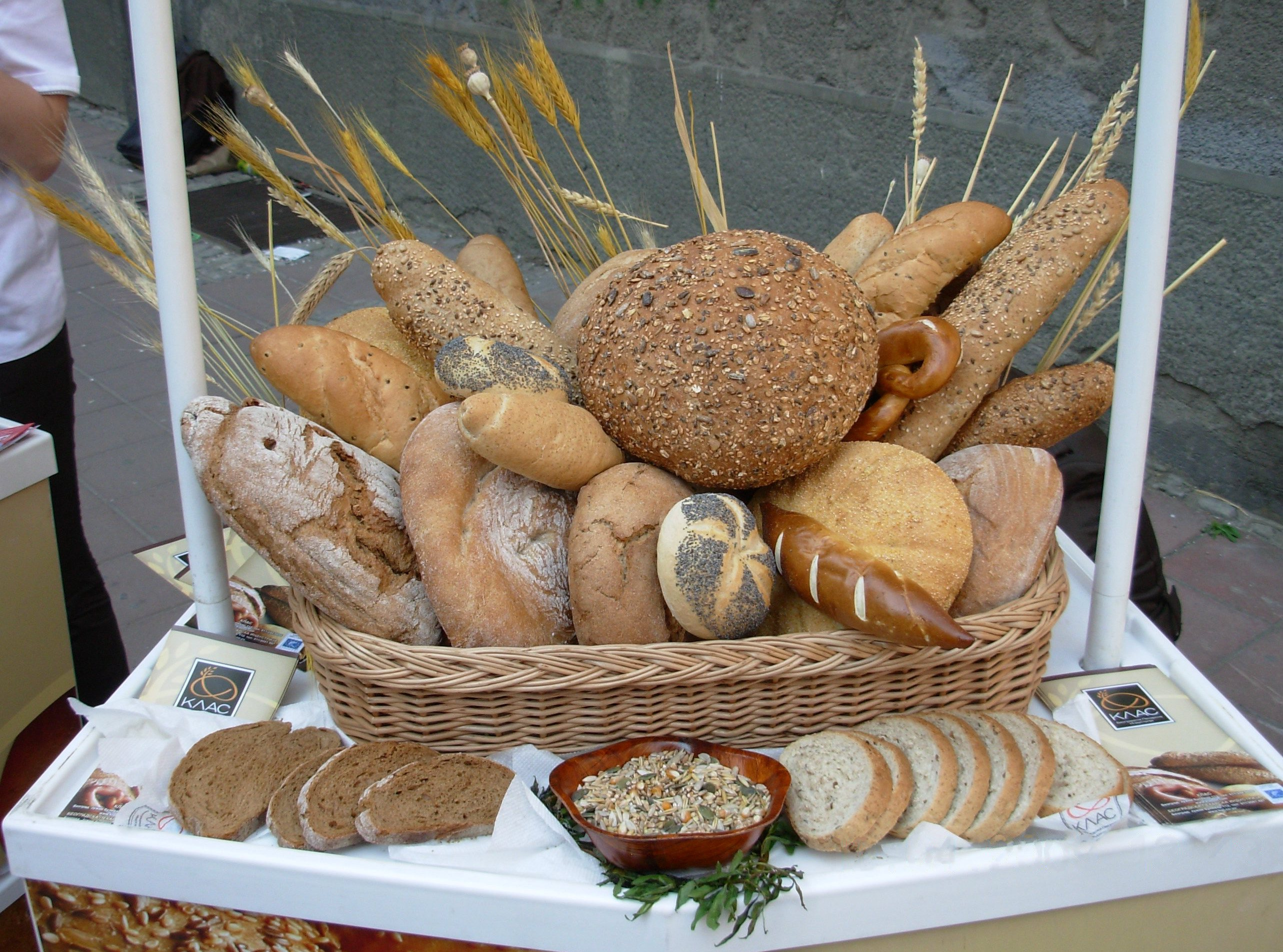 Хлеб и пециво. Снимио Голдфингер